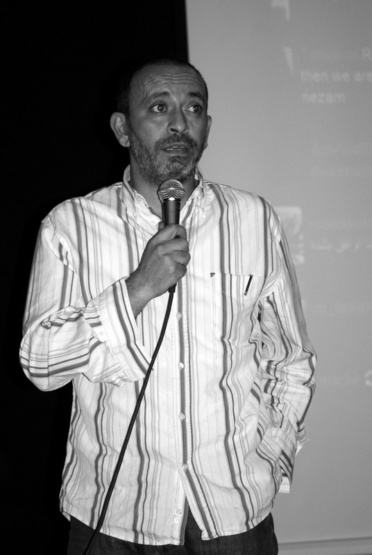 Wael Khalil